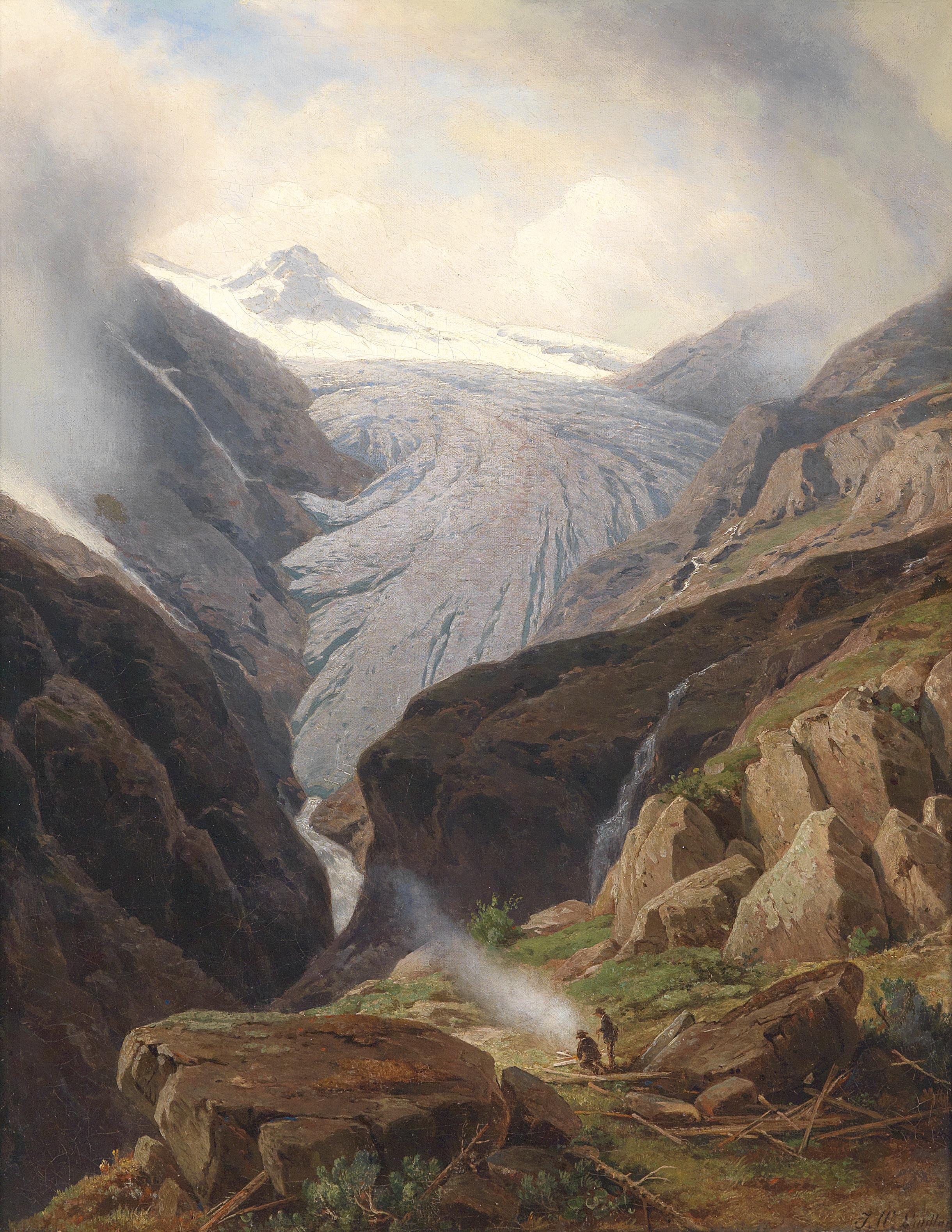 Rast am Fuße des Gletschers, signiert J. W. Lindlar, Öl auf Leinwand, 60 x 48 cm